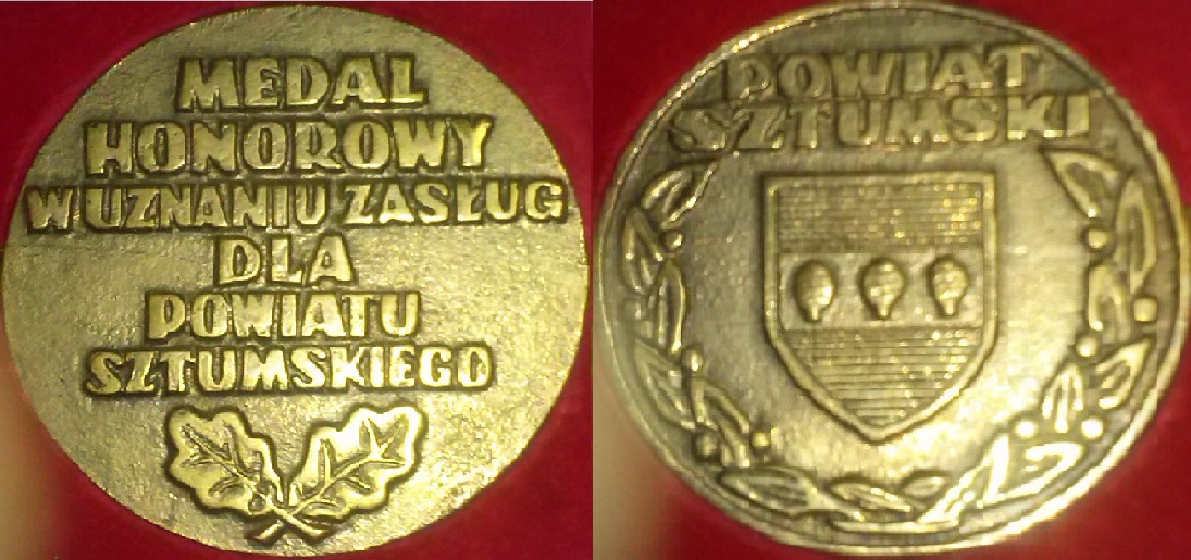 Dwie strony Medalu Honorowego "W uznaniu zasług dla powiatu sztumskiego"